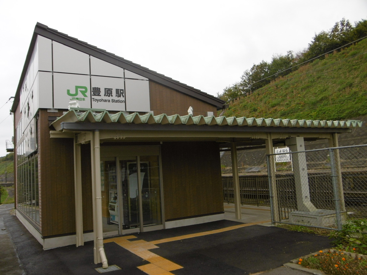 新築された豊原駅駅舎（2019年10月29日撮影）